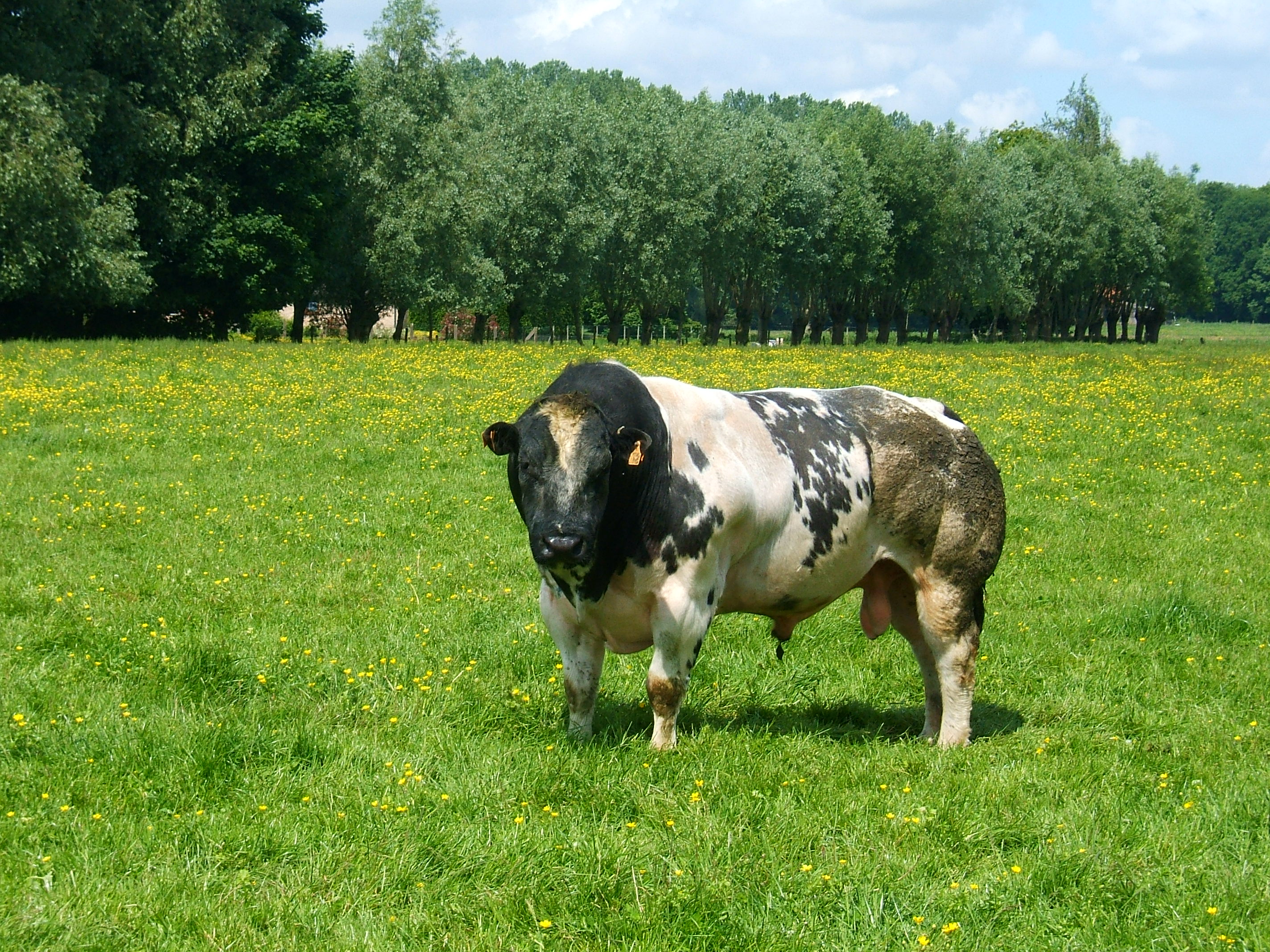 A Belgian Blue bull.